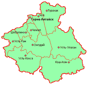 Адм.карта Алтая